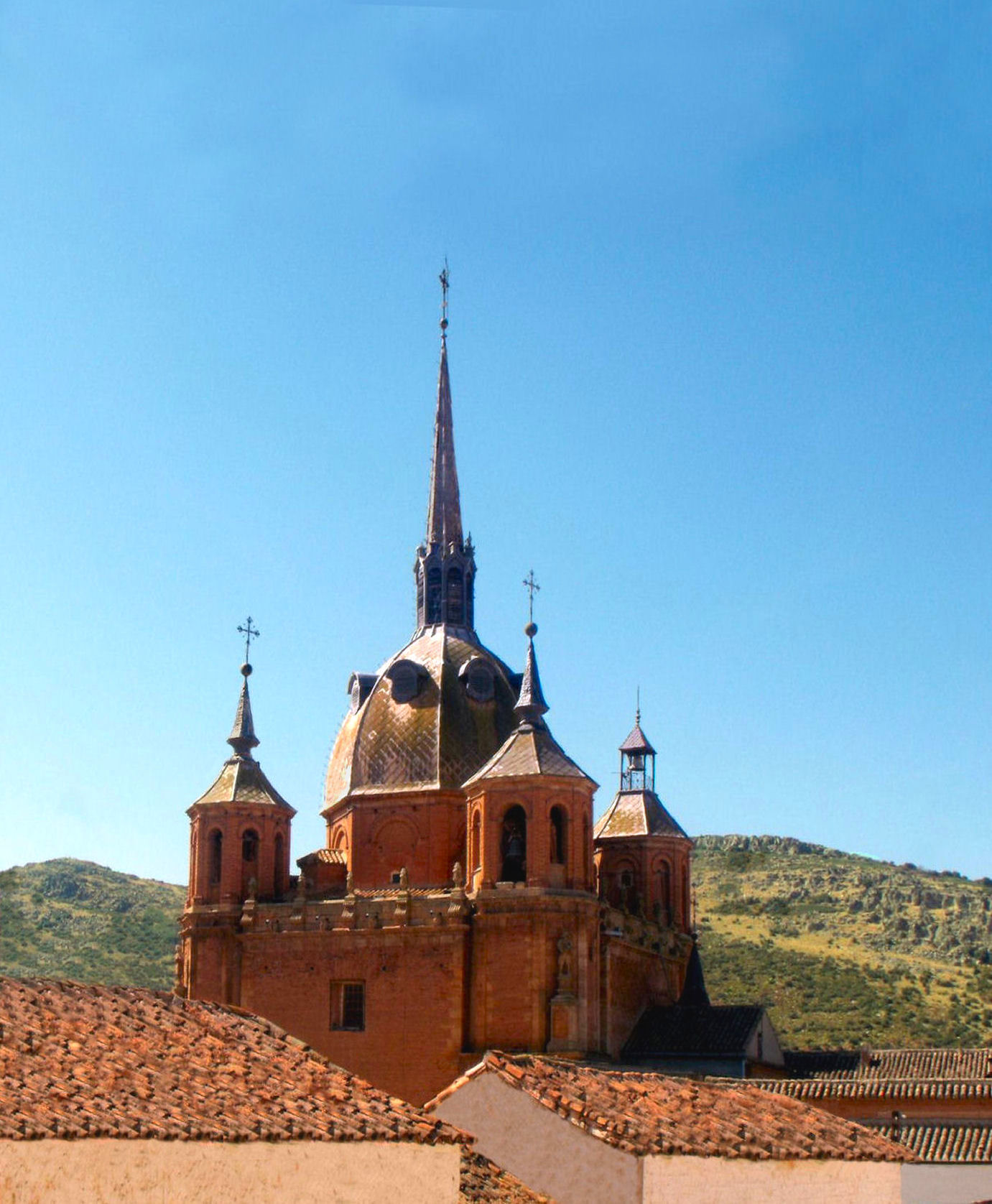 Iglesia de San Carlos del Valle, España